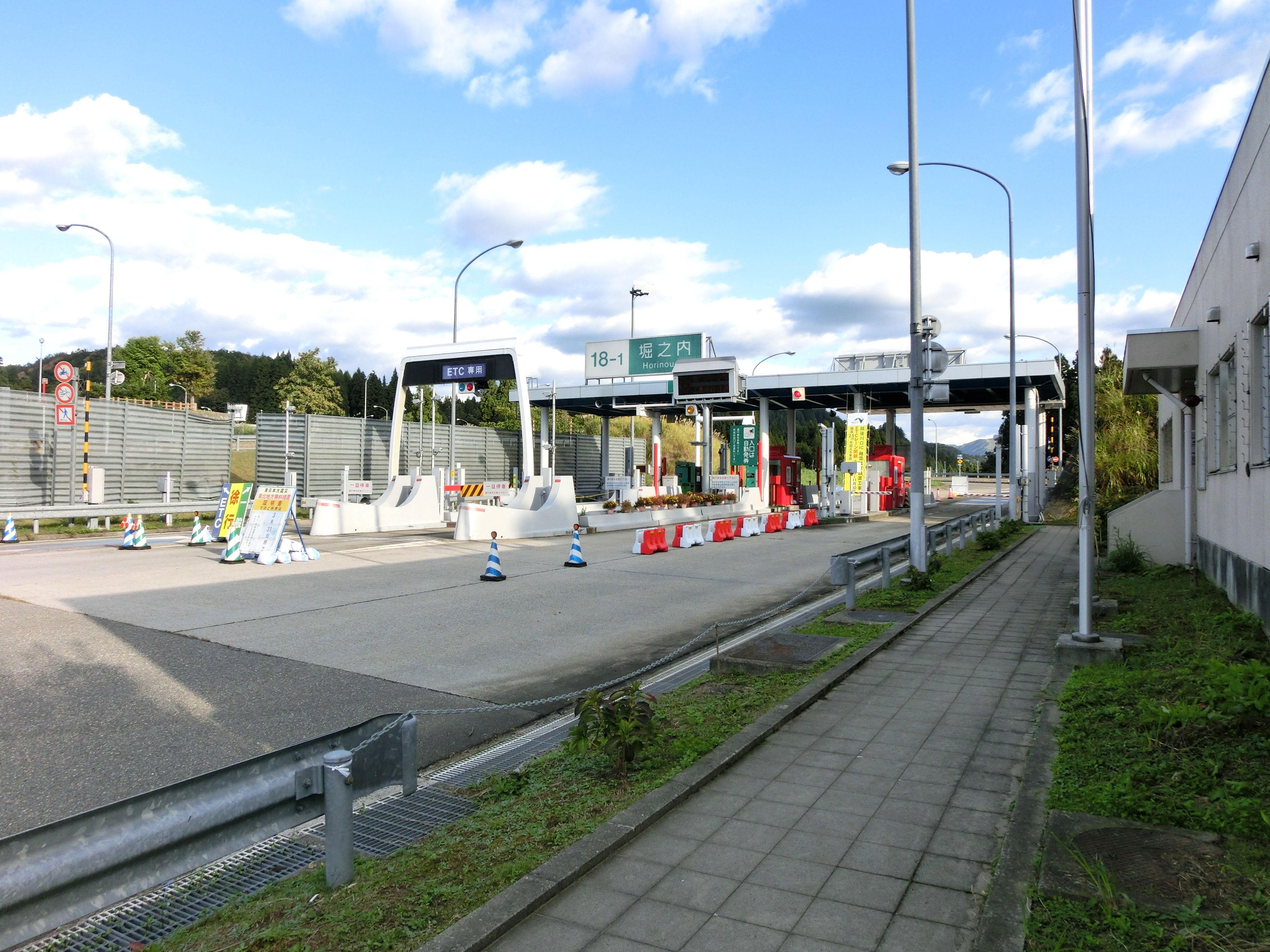 関越自動車道 堀之内インターチェンジ（料金所付近）